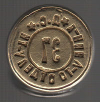 Касов печат с легенда "Д.С. У-НИЕ V-ТО ОТДЕЛ V-ТИ, 37" ОКОЛО 1950 ГОДИНА